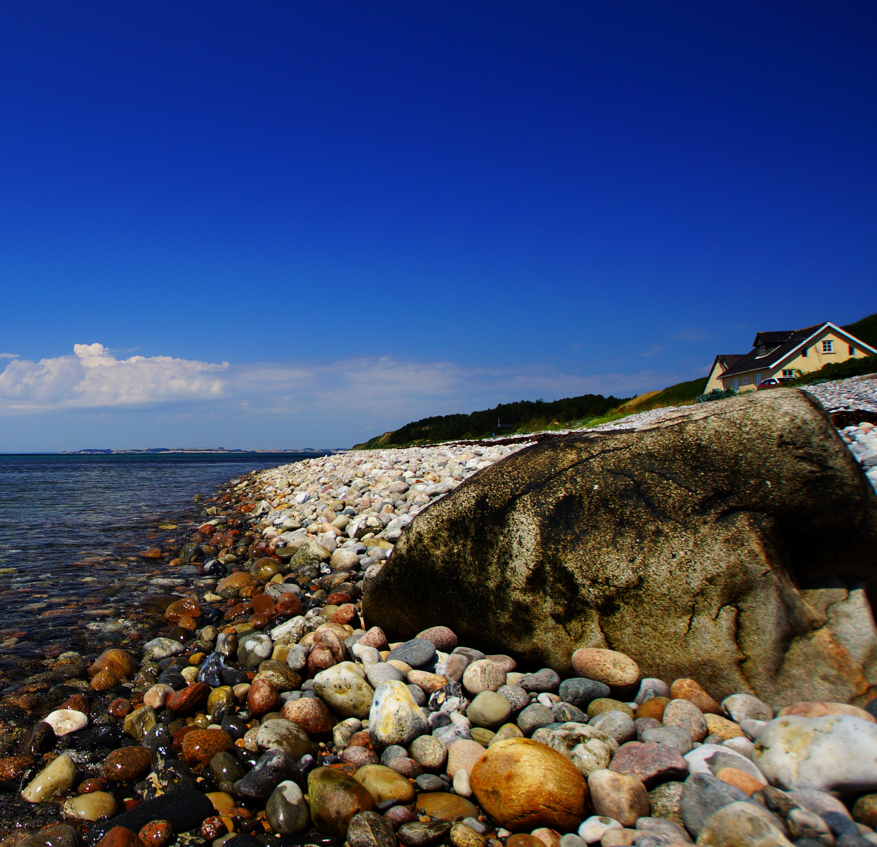 Sletterhage, Helgenæs, stenstrand